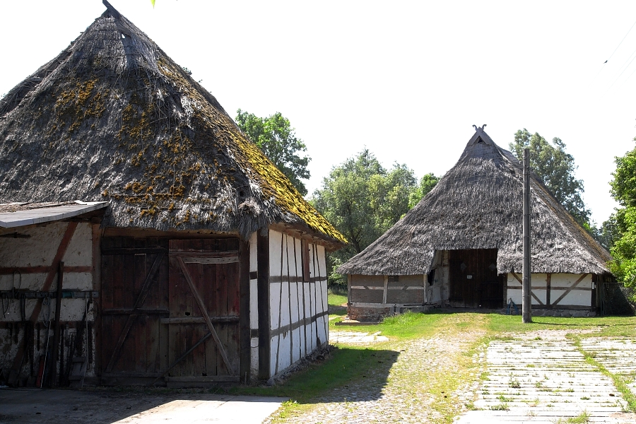 Bauernhaus in Sievershagen